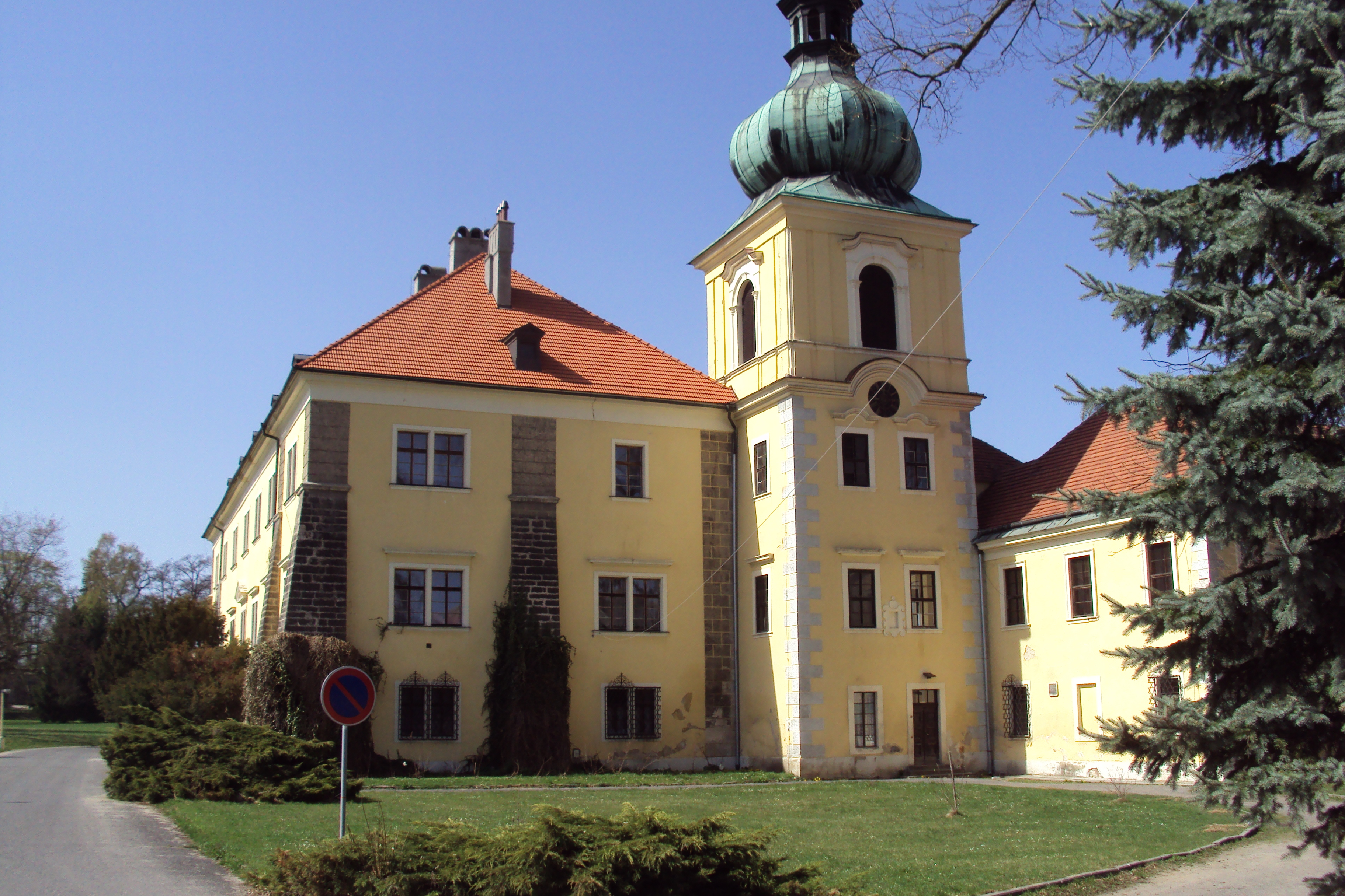 Zámek je ve městě